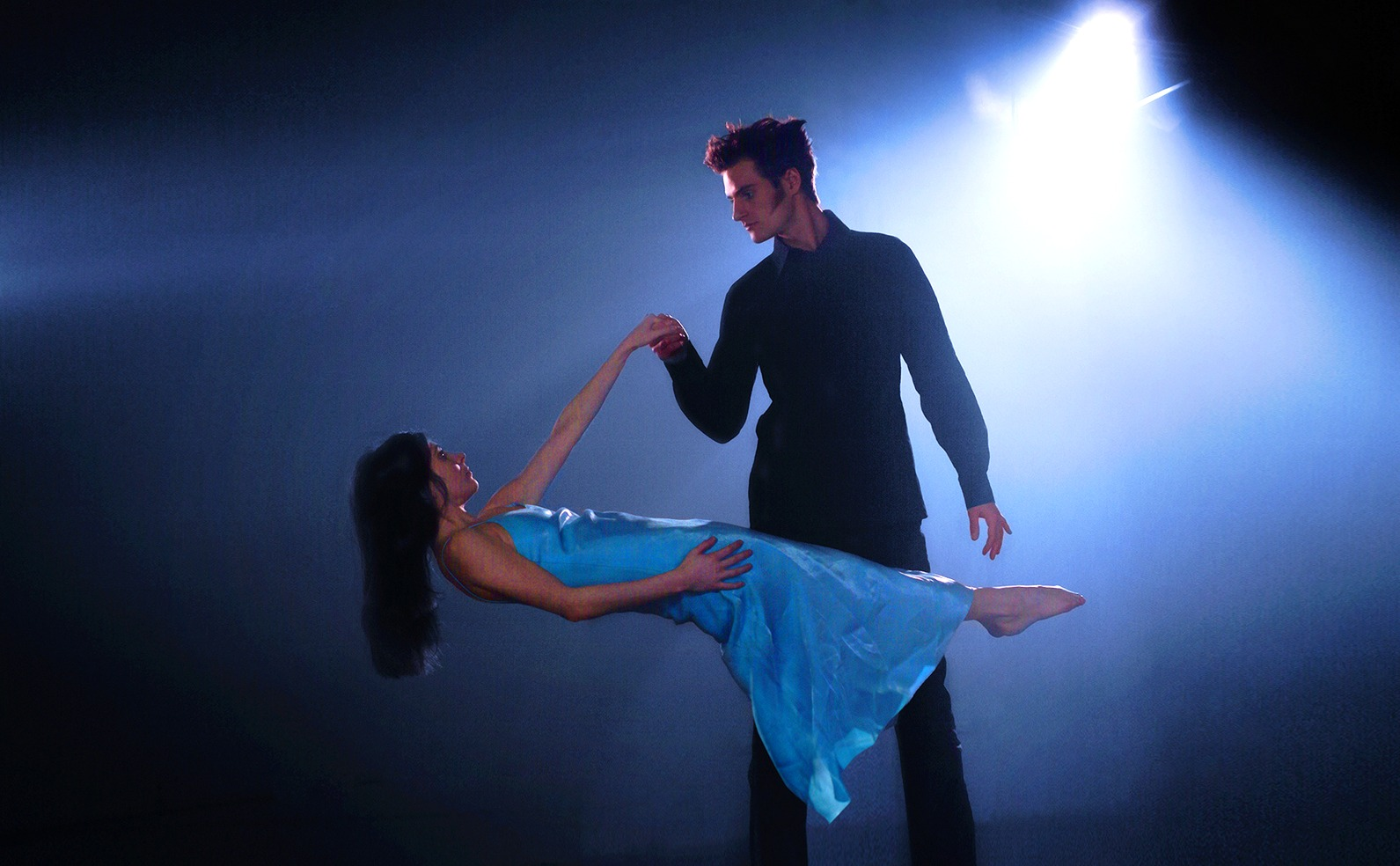 Julius Frack, Schwebende Dame